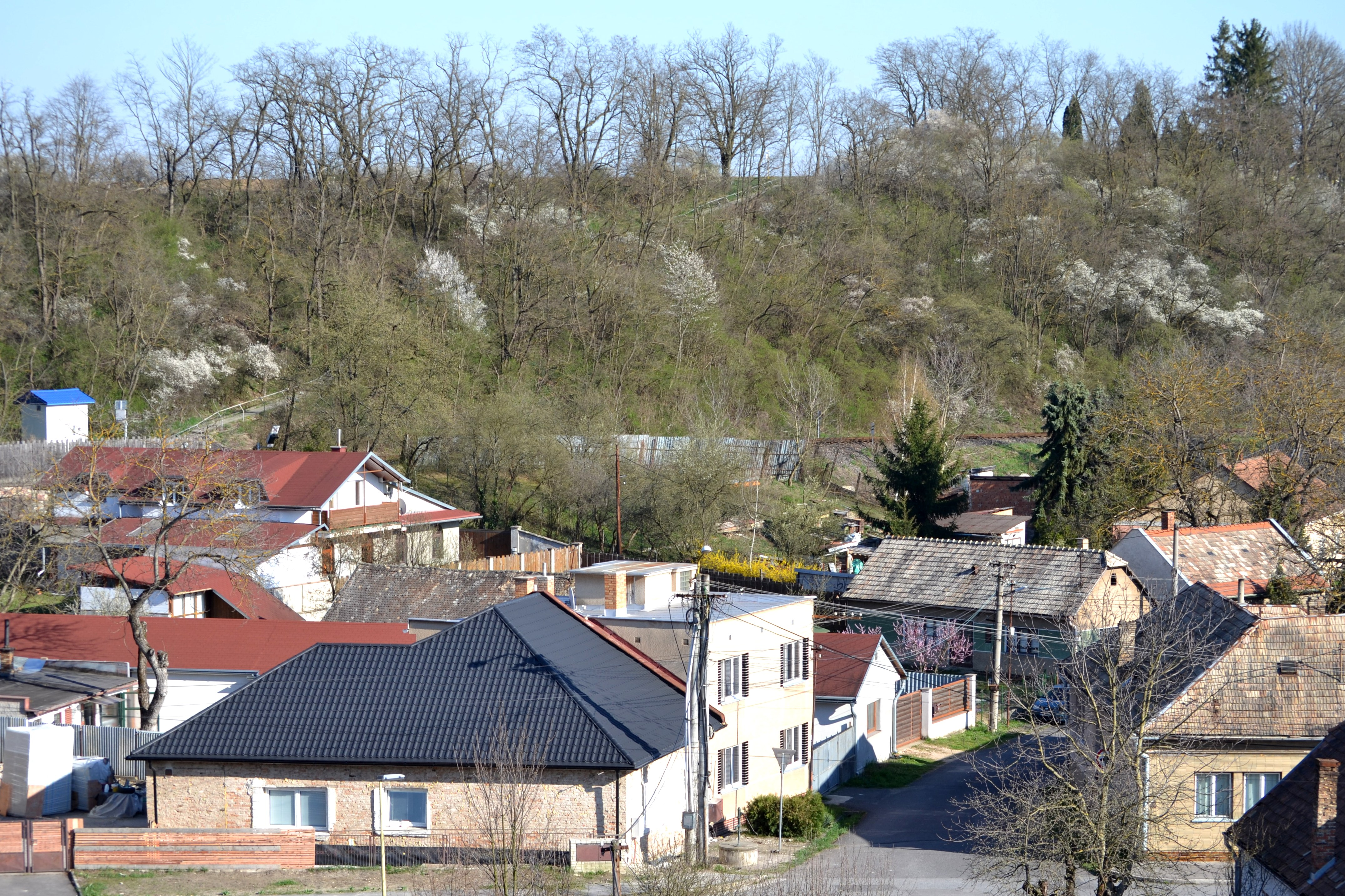 Opatová (Lučenec) schodisko k opatovskému cintorínu, kde bolo lokalizované miesto cisteriánskeho kláštora sv. Štefana (v roku 1451 sa tam odohrala pamätná bitka pri Lučenci)